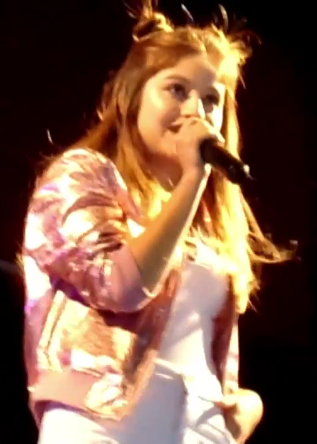 Karol Sevilla en concierto de su cumpleaños 18 en 2017